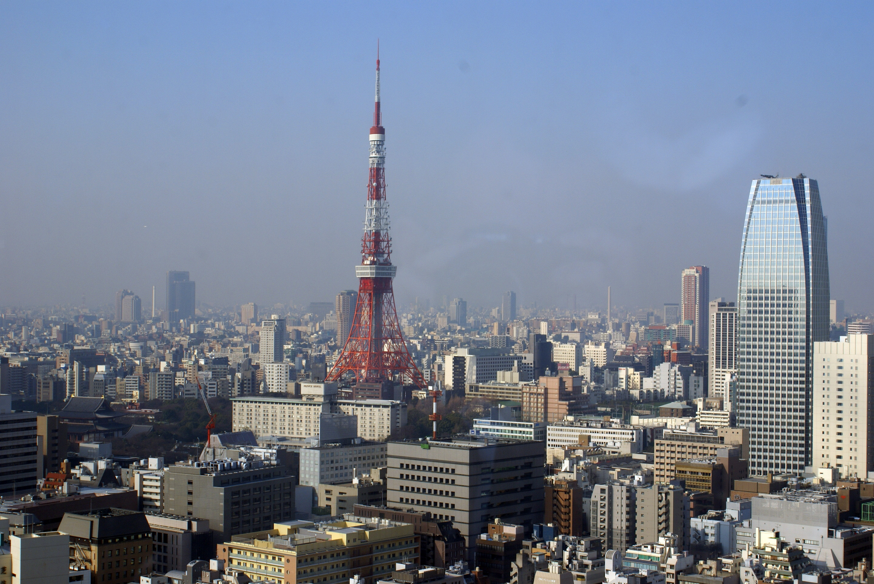 TOKYO TOWER